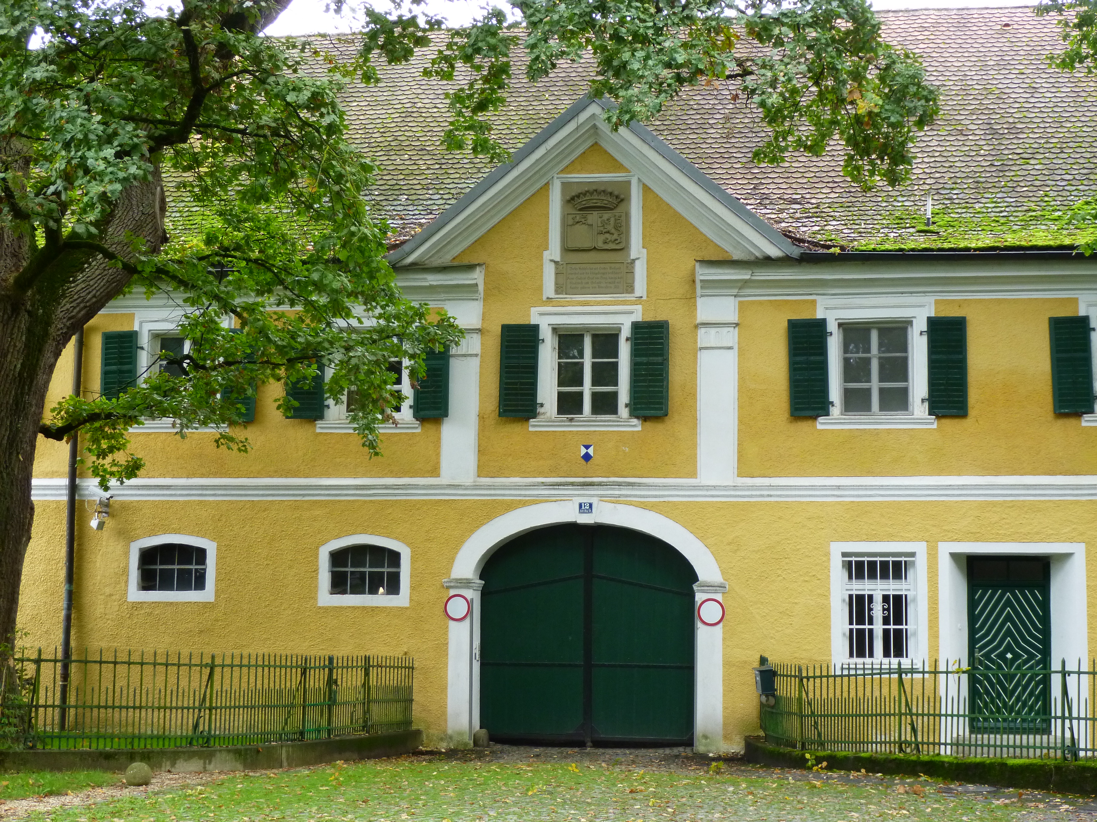 Das Schloss Irlbach in der Graf-von-Bray-Str. 12 in Irlbach, Lkrs. Straubing-Bogen. Das Schloss ist eine um einen kleinen Innenhof gruppierte Anlage aus dem Jahr 1569, umgeben vom Schlosspark im englischen Stil des 19. Jahrhunderts.This is a photograph of an architectural monument.